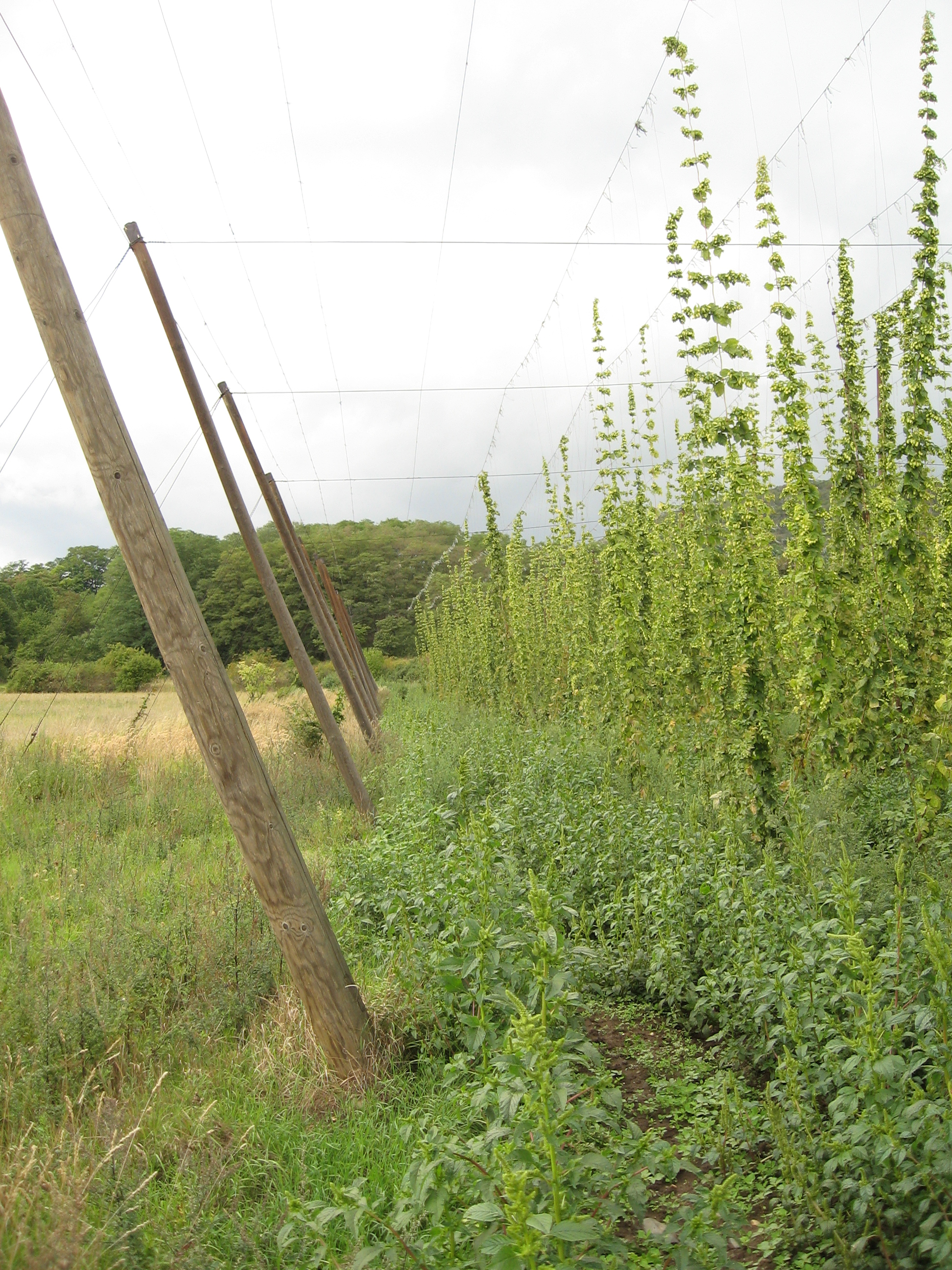 Humulus lupulus, Chmel otáčivý na chmelnici u Ctiněvsi